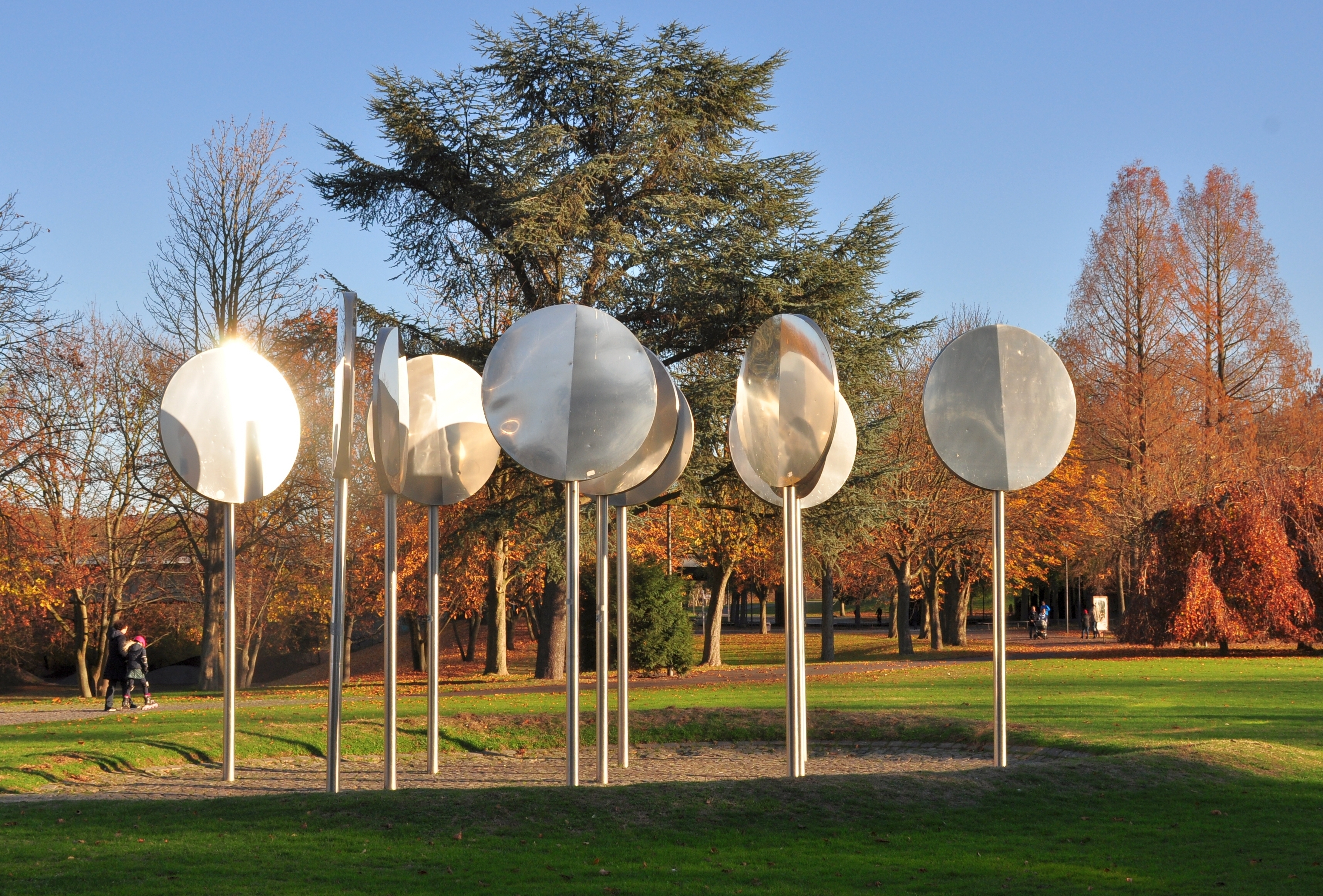 Löffelwald von Hermann Goepfert/Johannes Peter Hölzinger